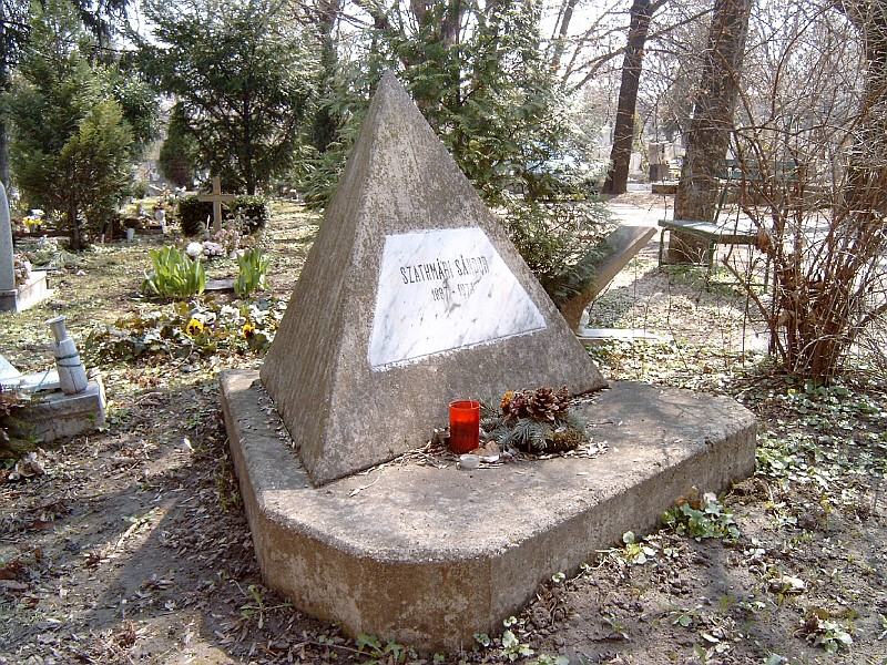 Szathmáry Sándor (Gyula, 1897. június 19. – Budapest, 1974. szeptember 27.) magyar gépészmérnök, író, műfordító. sírja Budapesten. Farkasréti temető: 32/1-1-sarok.